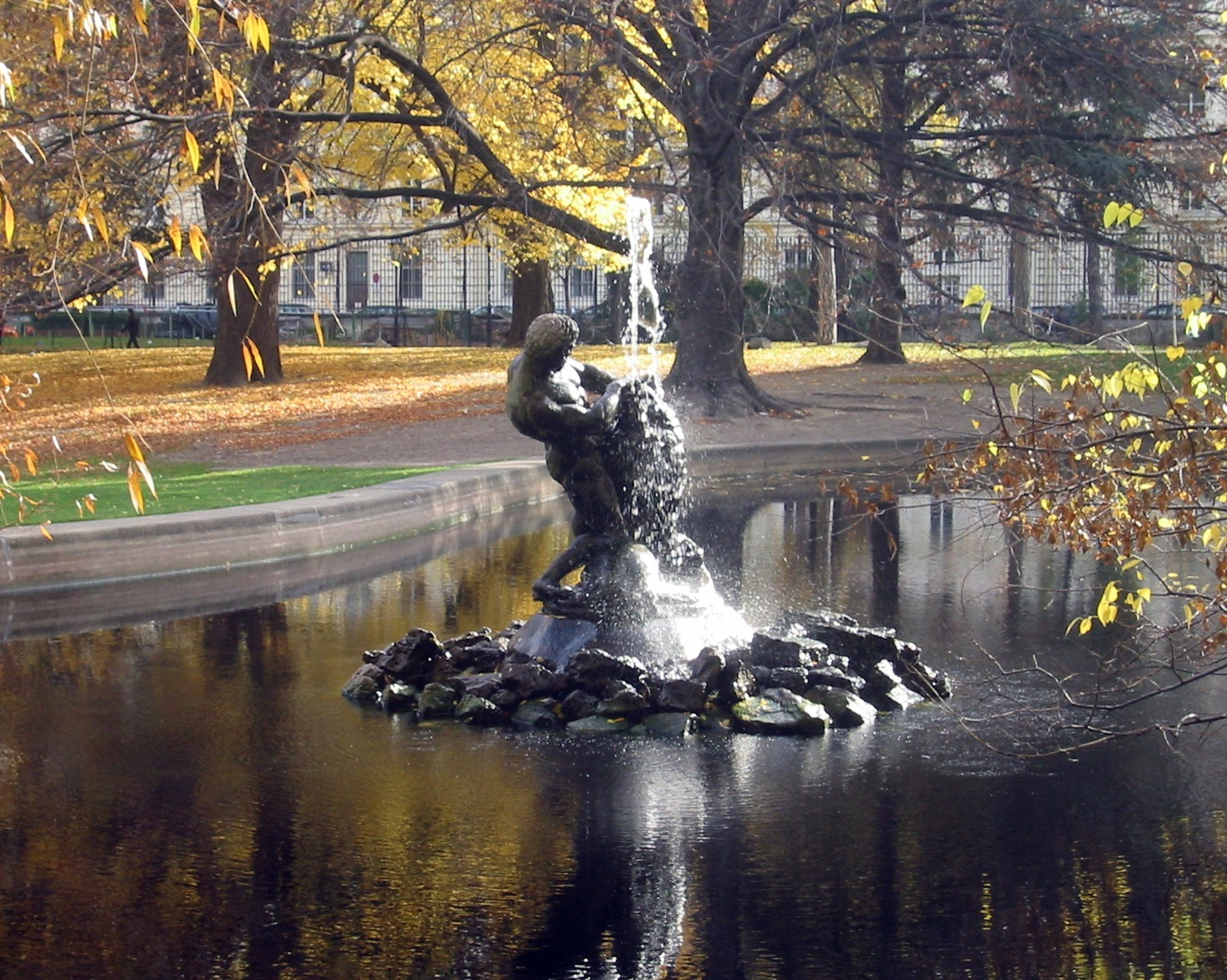 Wien, Herkulesbrunnen im Burggarten, mit spätbarocker Bleiskulptur „Herkules mit dem Nemeischen Löwen“, um 1770, ursprünglich im Esterházypark, seit 1948 im Burggarten.